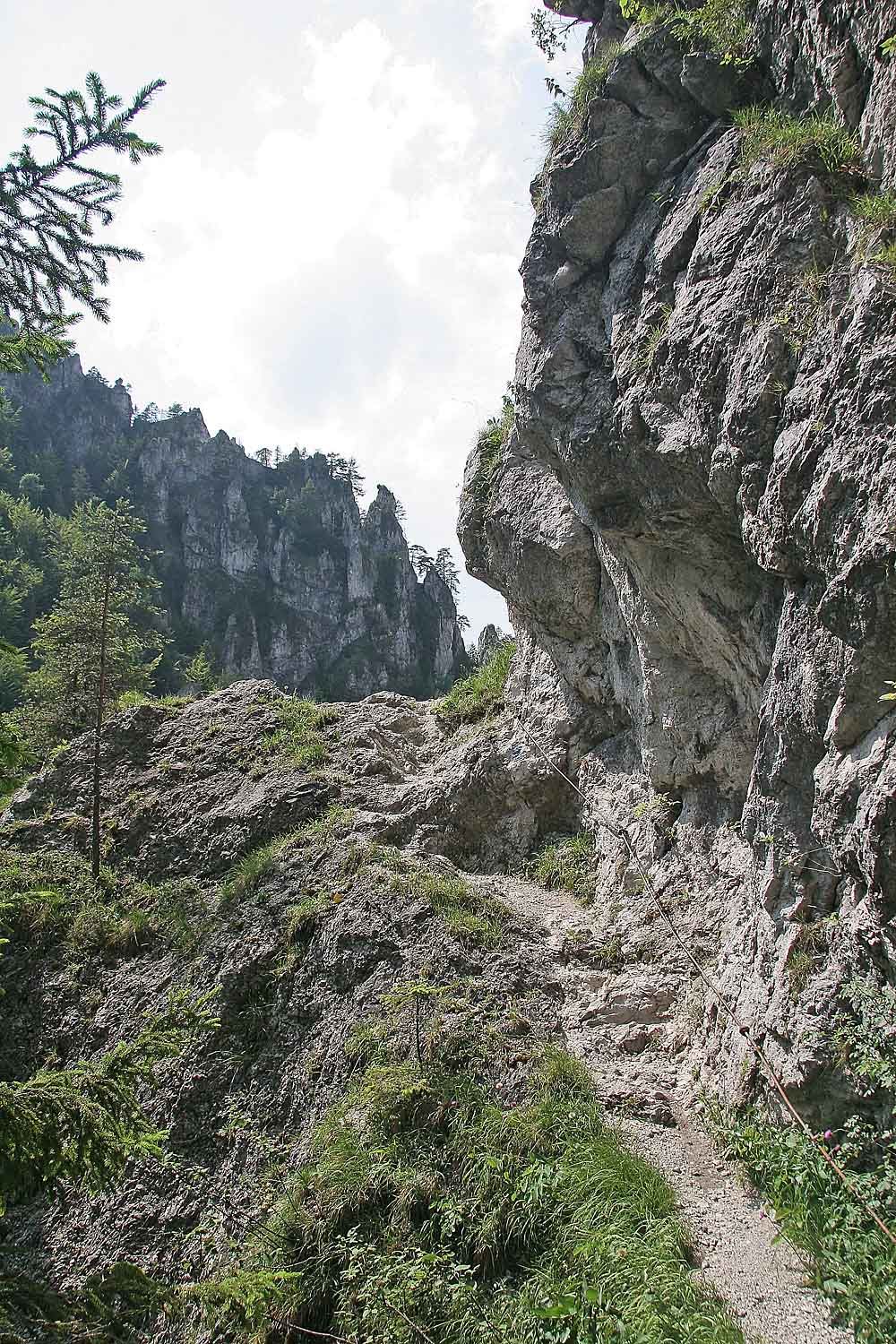 Dolina Obšívanka, Malá Fatra, district Žilina, Slovakia autor: Prazak Date 28. 6. 06